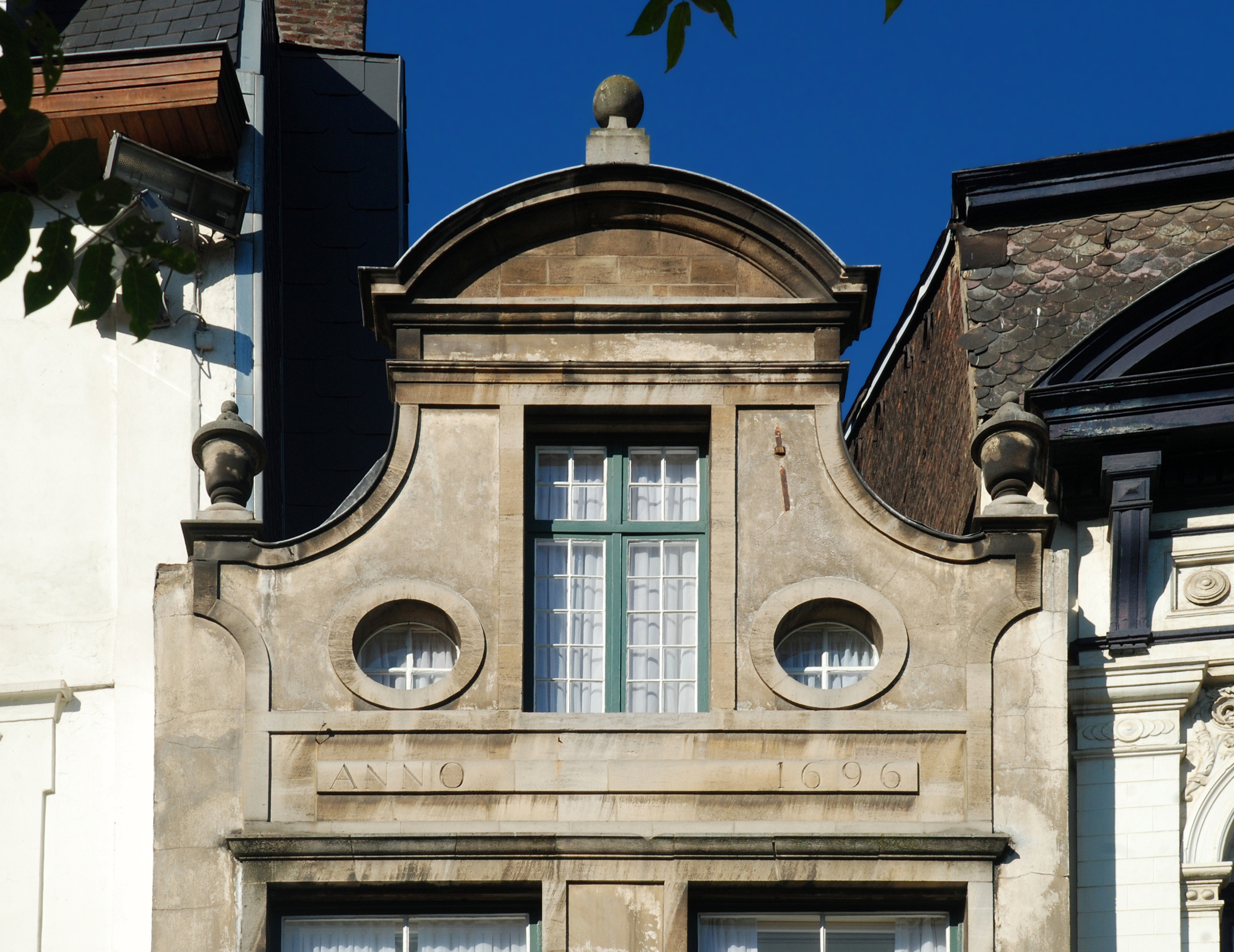 Belgique - Bruxelles - Maison de Saint-Paul